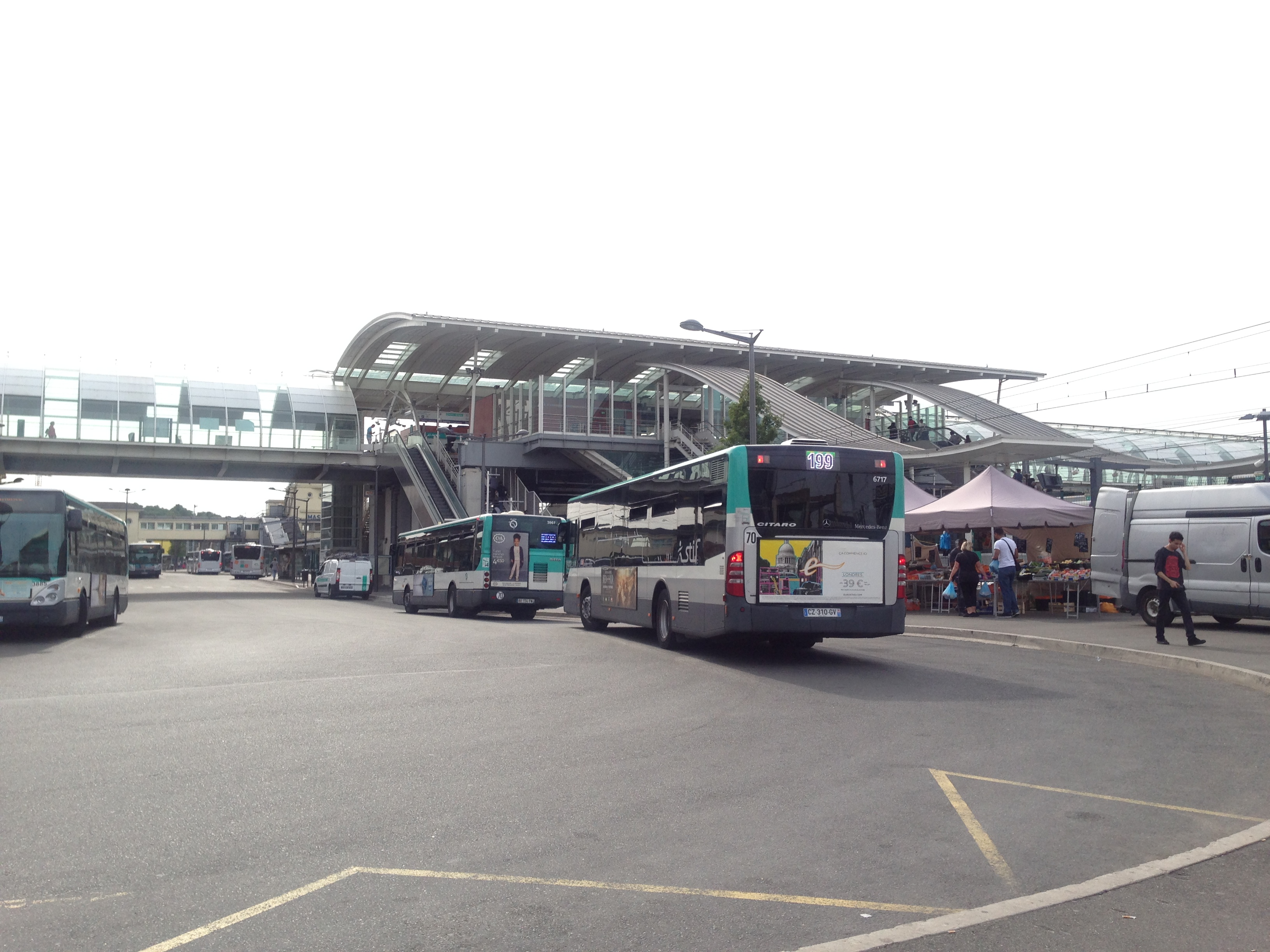 Les Bus en gare de Massy-Palaiseau